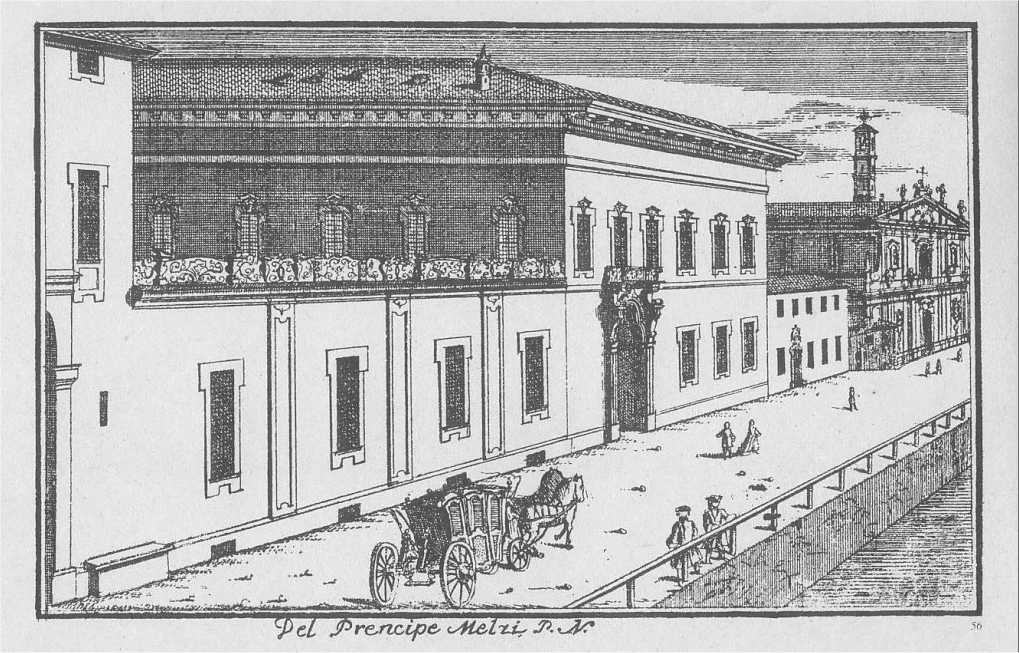 Palazzo Melzi a Milano in via Fatebenefratelli in una stampa d'epoca